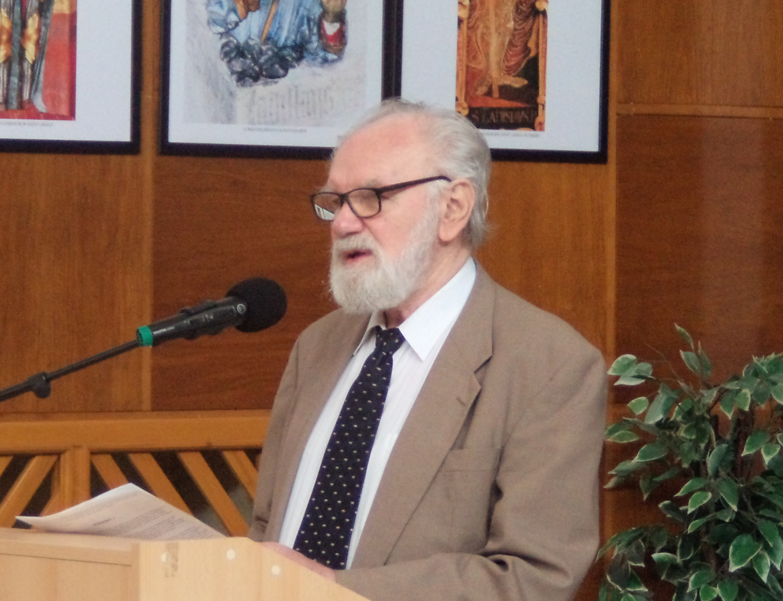 Udvard 2017. április 29.